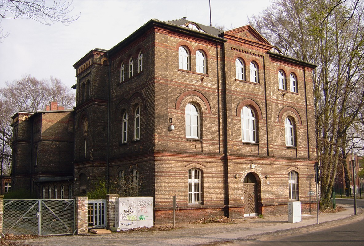 Berlin-Spandau, Eiswerderstraße 13, Verwaltungsgebäude der Feuerwerkslaboratorien, später Gottlob-Münsinger-Schule